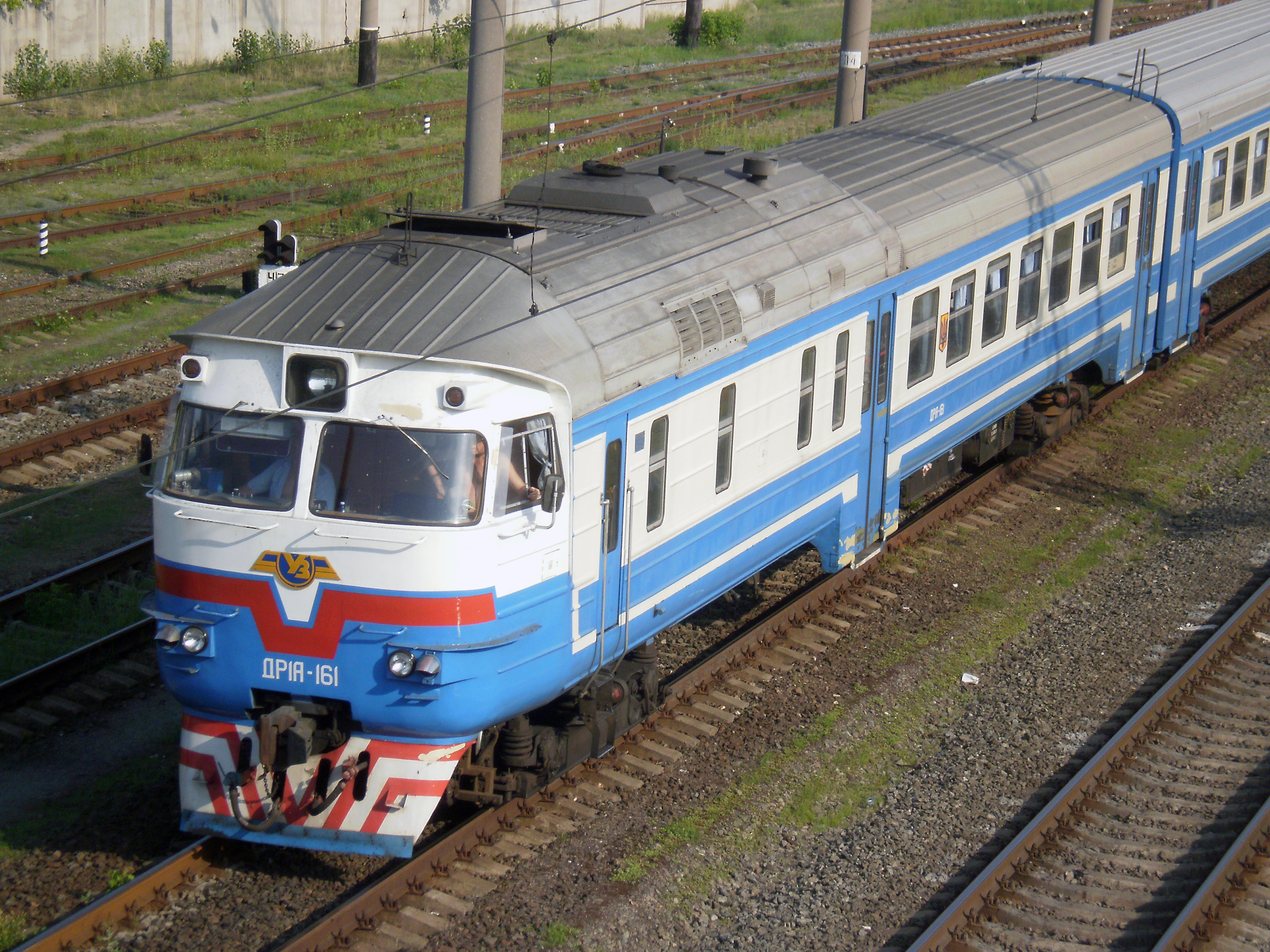 Дизель-поезд ДР1А-161